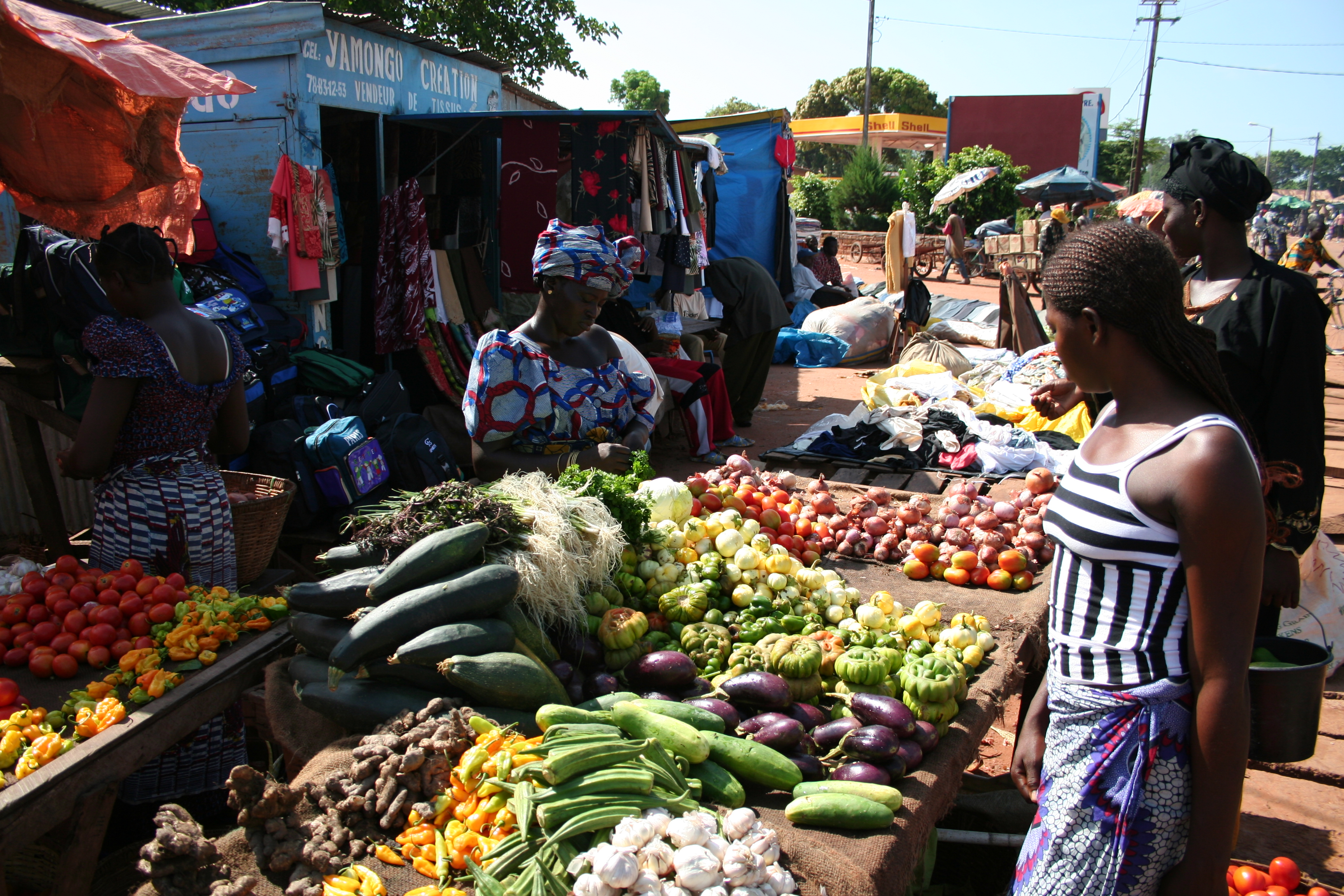 Market in Banfora, Burkina Faso